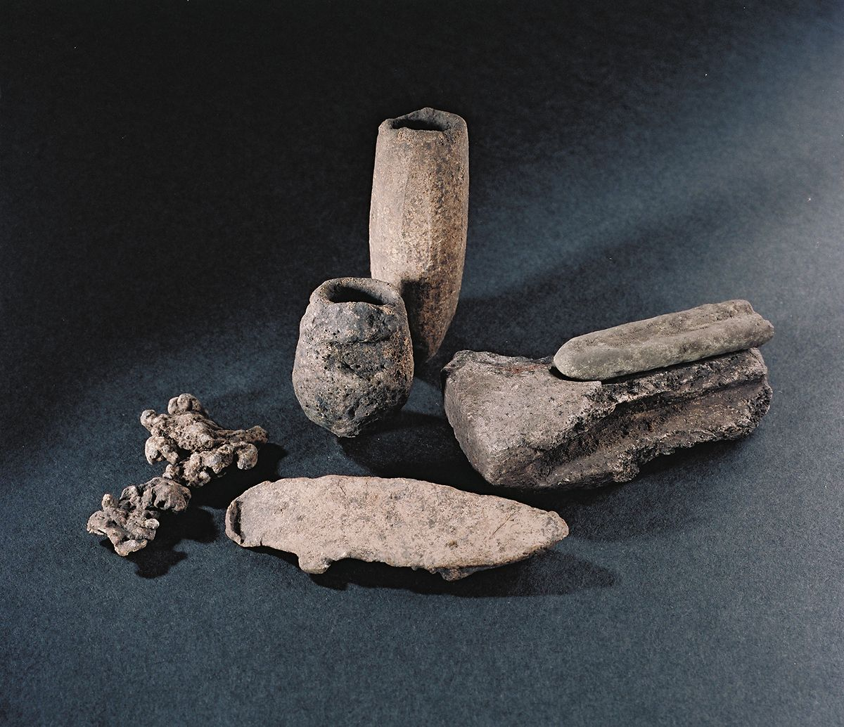 Redskaper og avfall fra vikingtidsbyen Kaupang. Smeltedigler, messingbarre, blybarre, blyklumper og støpeform i kleber.